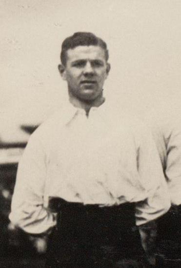 Gé Fortgens - was een Nederlands voetballer.